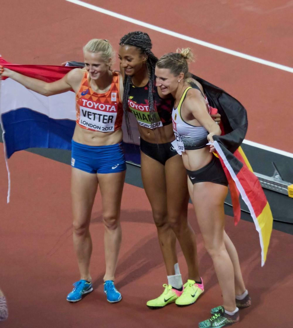 d2_37 hept ereronde thiam